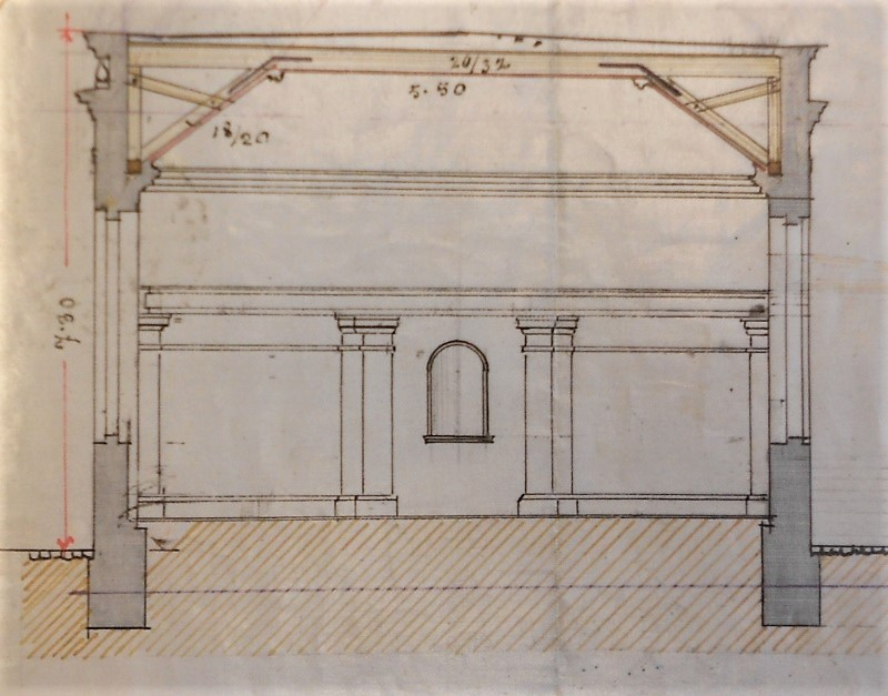 Bubenská synagoga